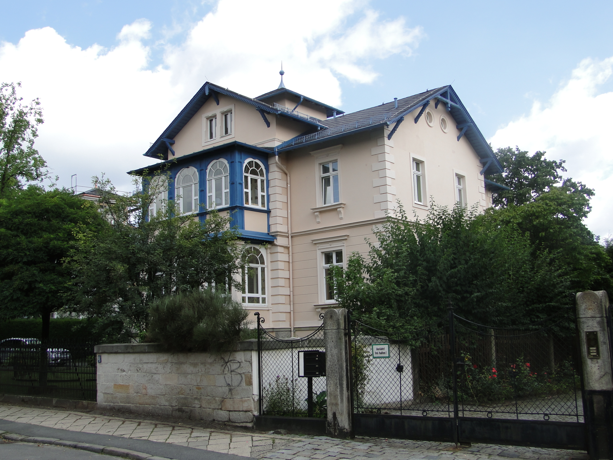 Die Villa Maria im Dresdner Stadtteil Loschwitz